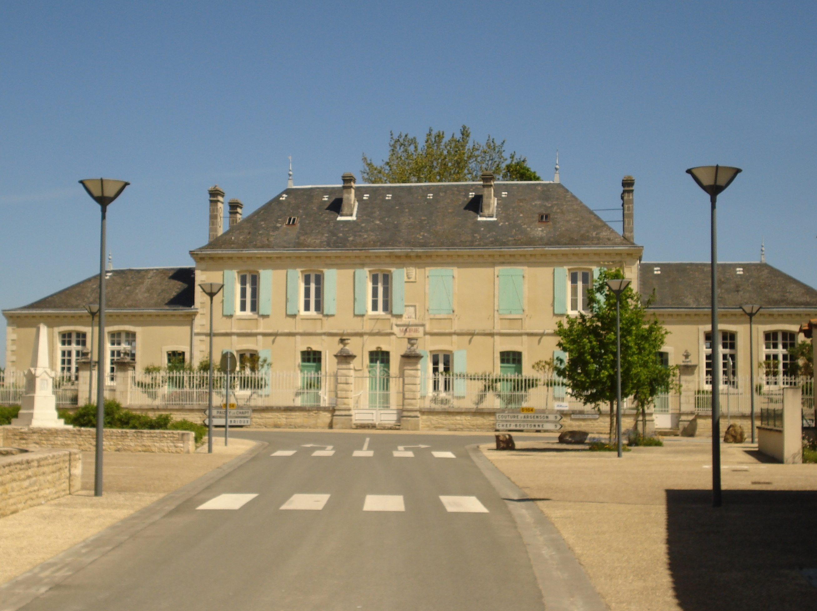 La mairie d'Aubigné (Deux-Sèvres)